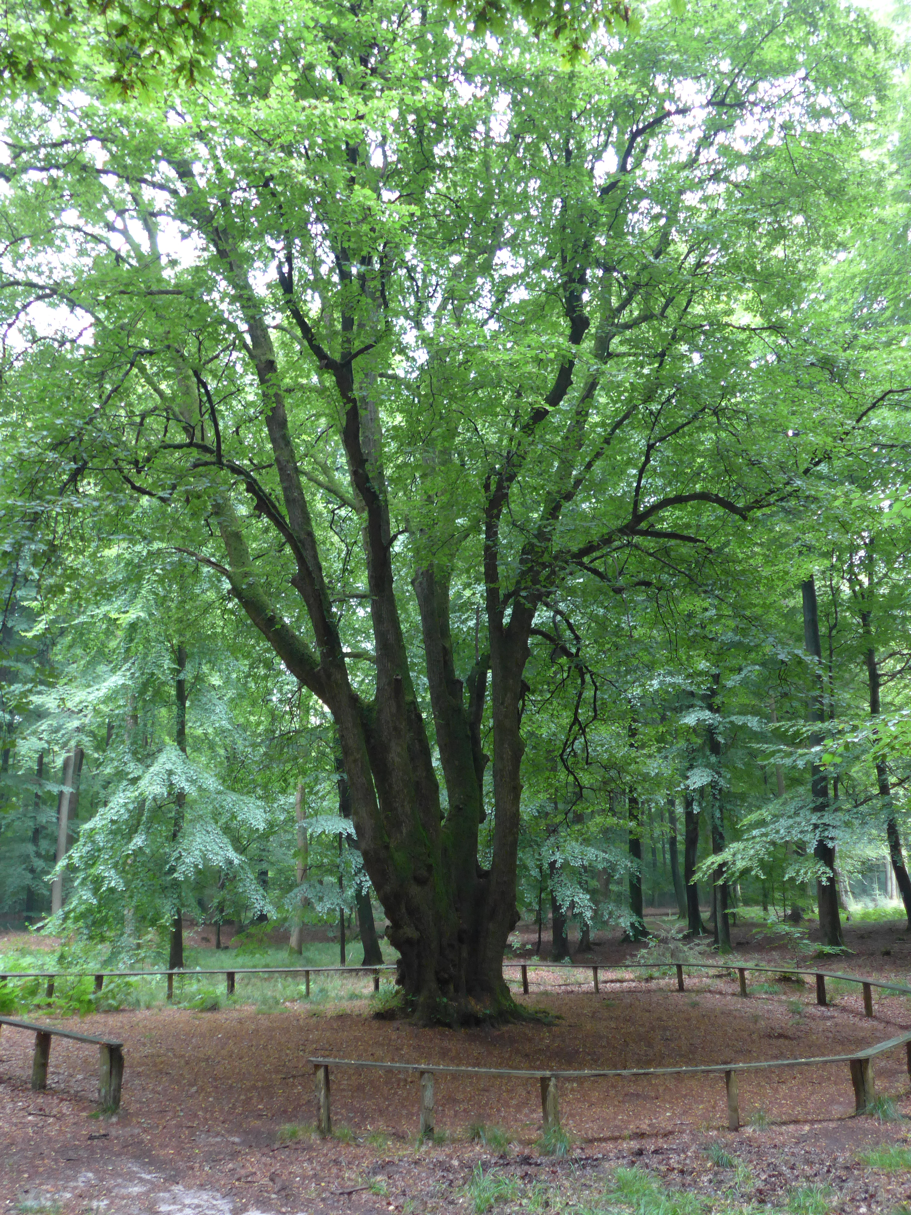 Naturdenkmal 5-Fingerlinde bei Odderrade im Riesewohld